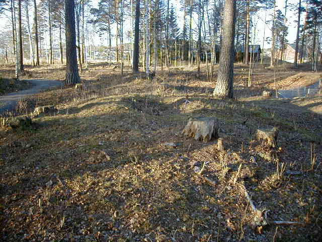 Fra Veien Kulturminnepark